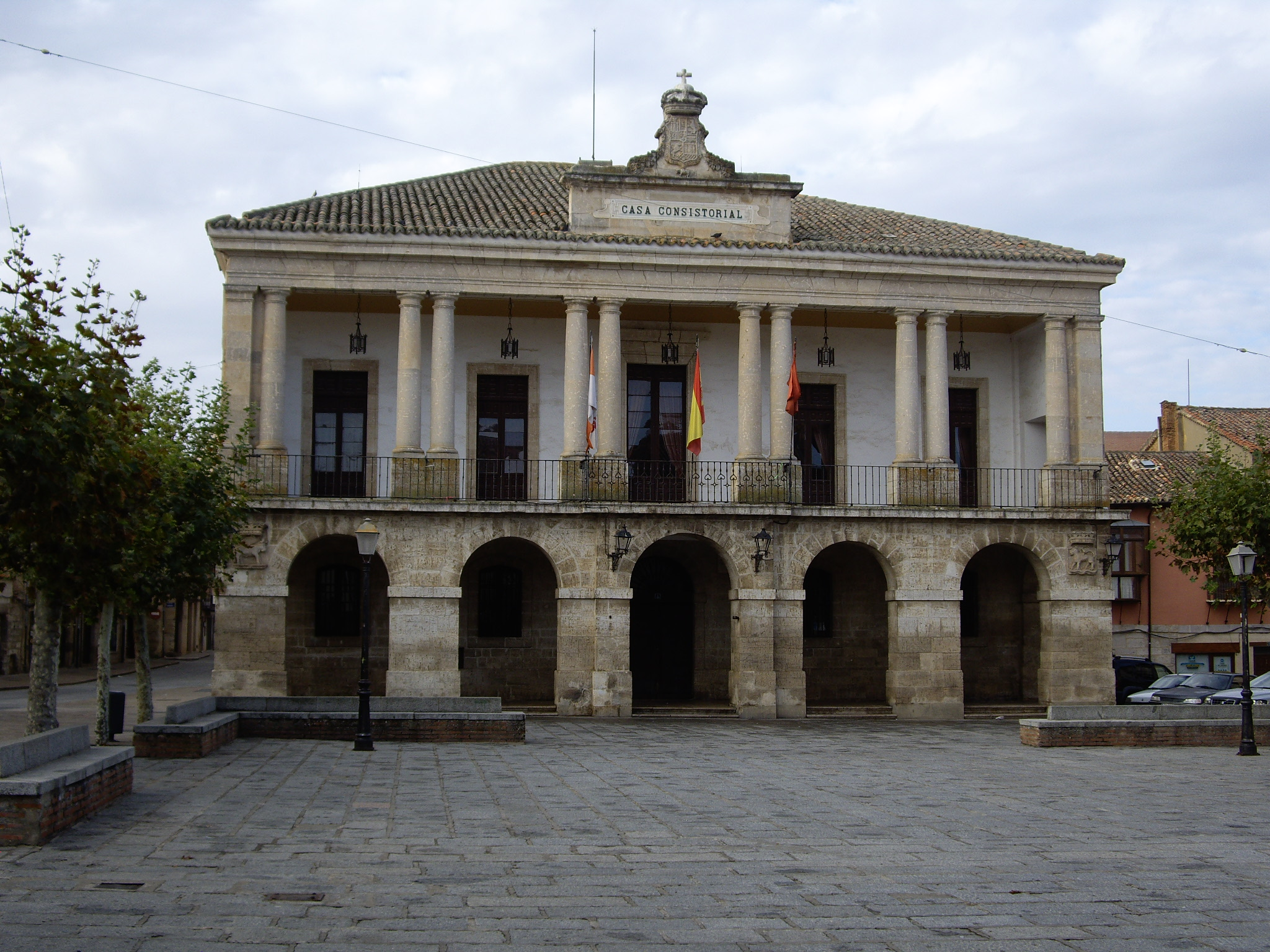 Toroko udaletxea